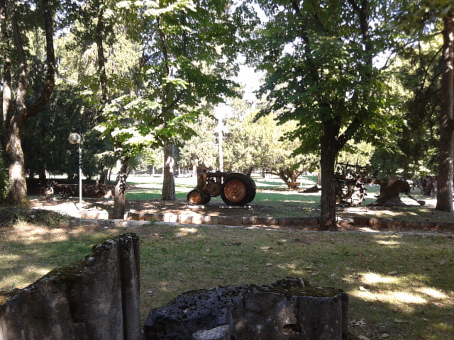 Frammenti della statua originaria della Madonna dell'Incile, sullo sfondo i trattori Landini